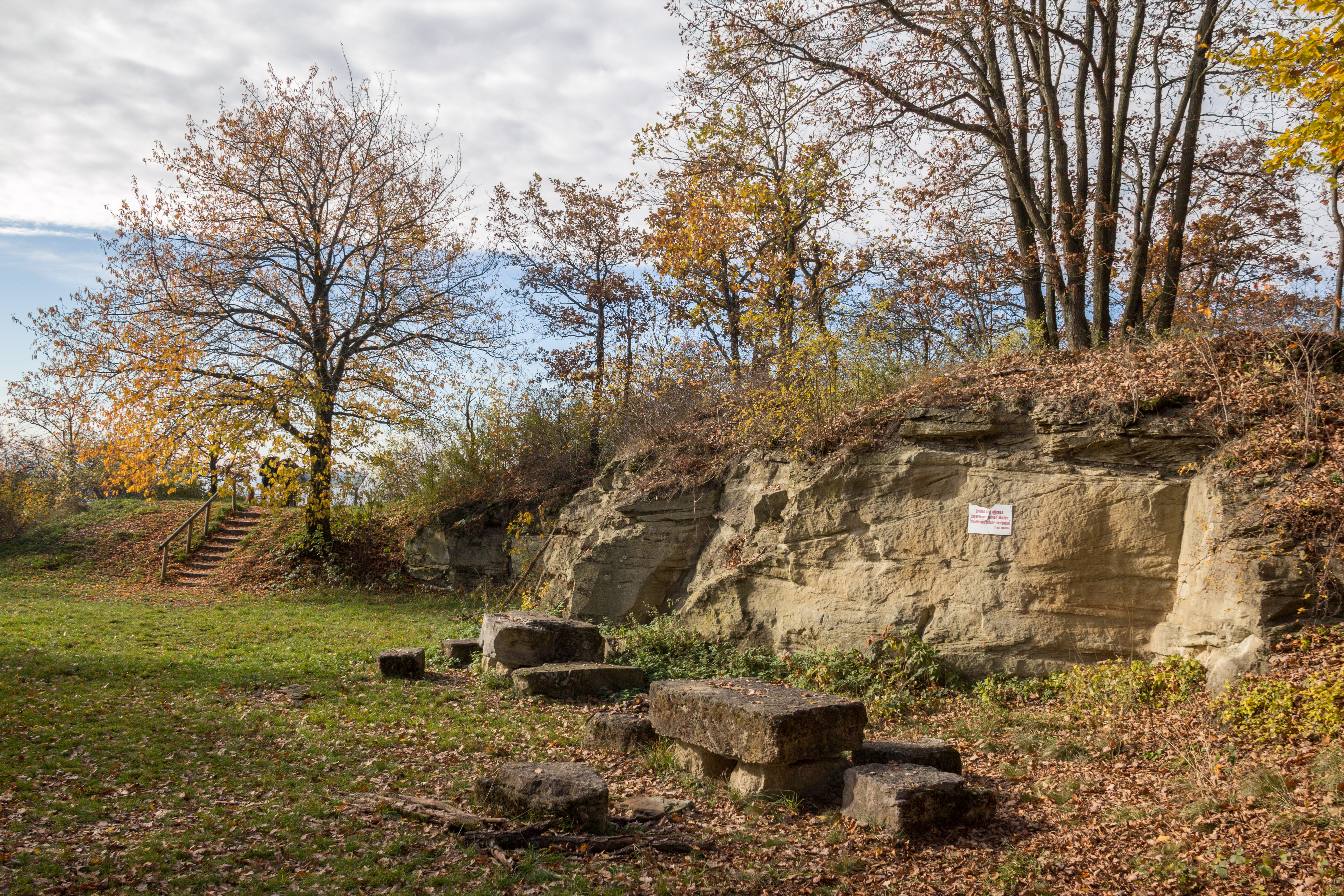 Aufschlüsse, Geotop, Iphofen, Gipskeuper am Schwanberg